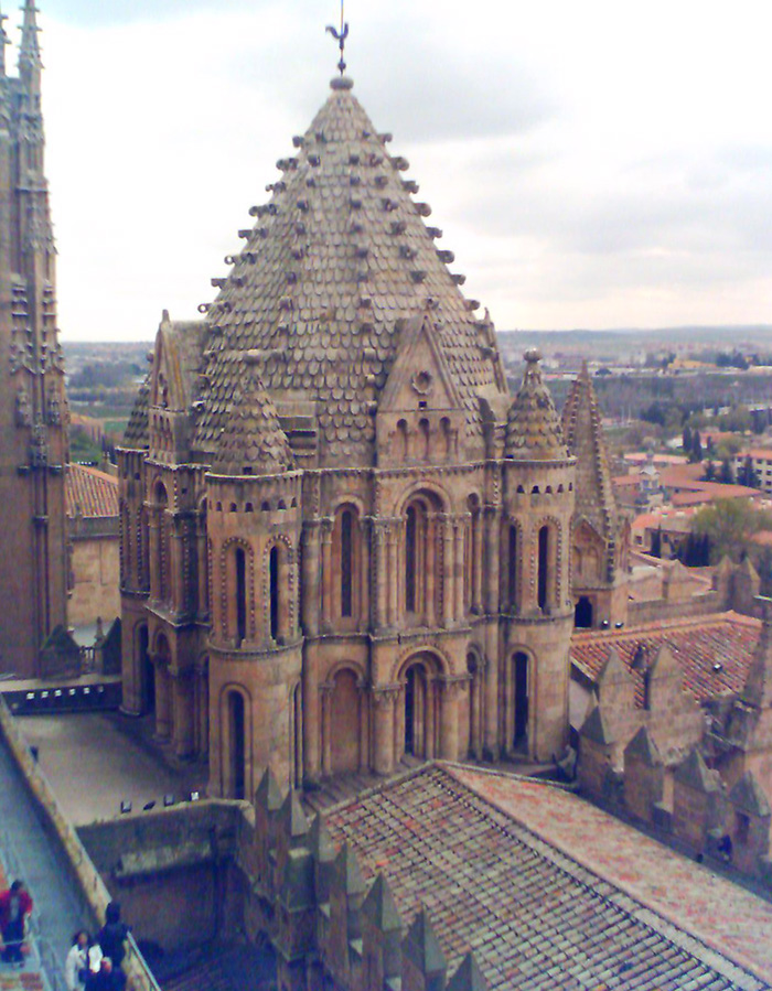 Exterior del cimborrio románico de la Catedral románica de Salamanca ( llamada la vieja)